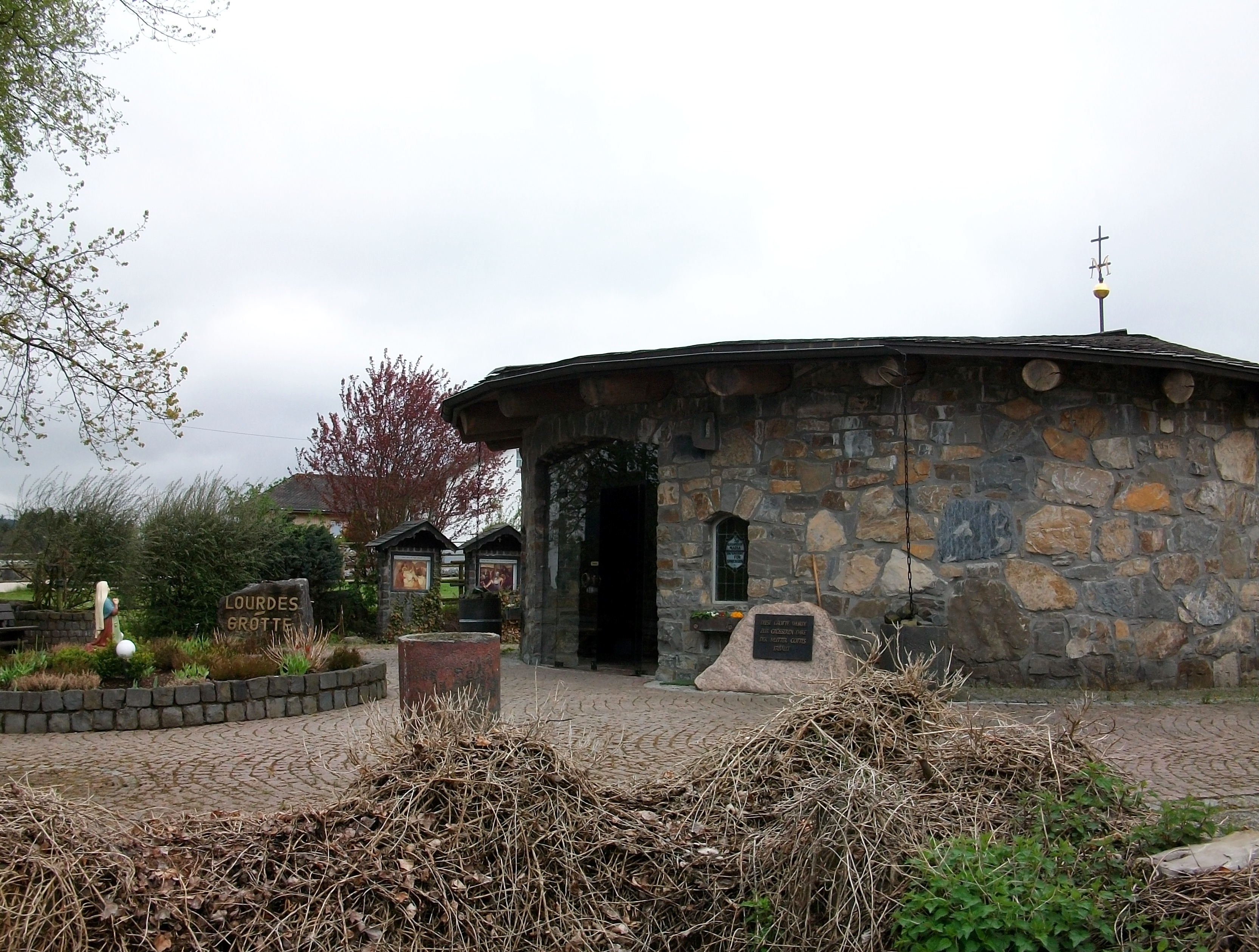 Bestwig-Grimlinghausen, Lourdes Grotte (Germany)